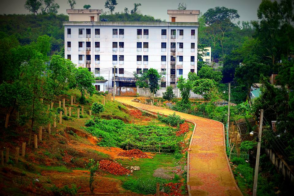 সুহাসিনী দাস হল, সিলেট কৃষি বিশ্ববিদ্যালয়।